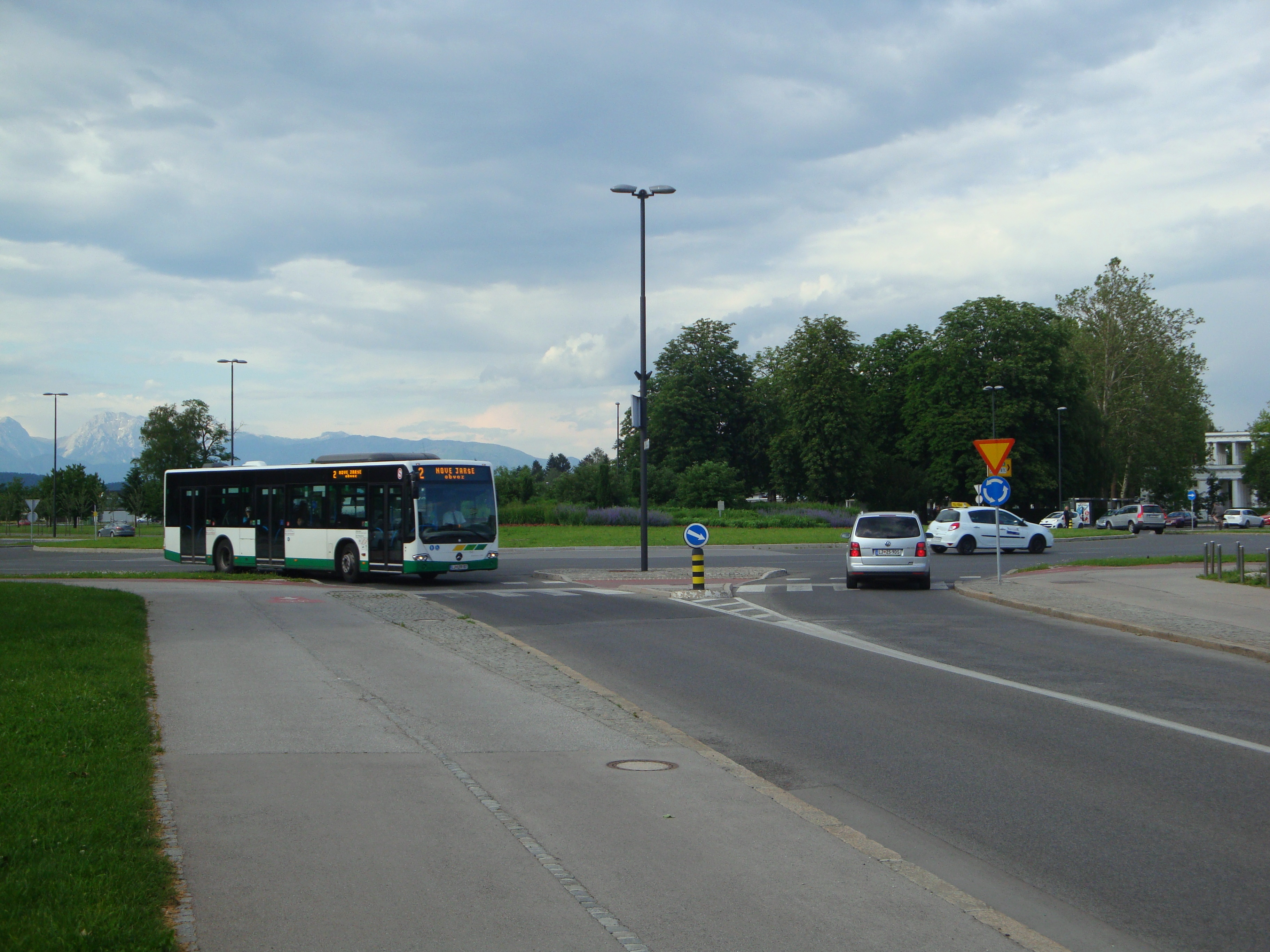 Krožišče Žale, Ljubljana